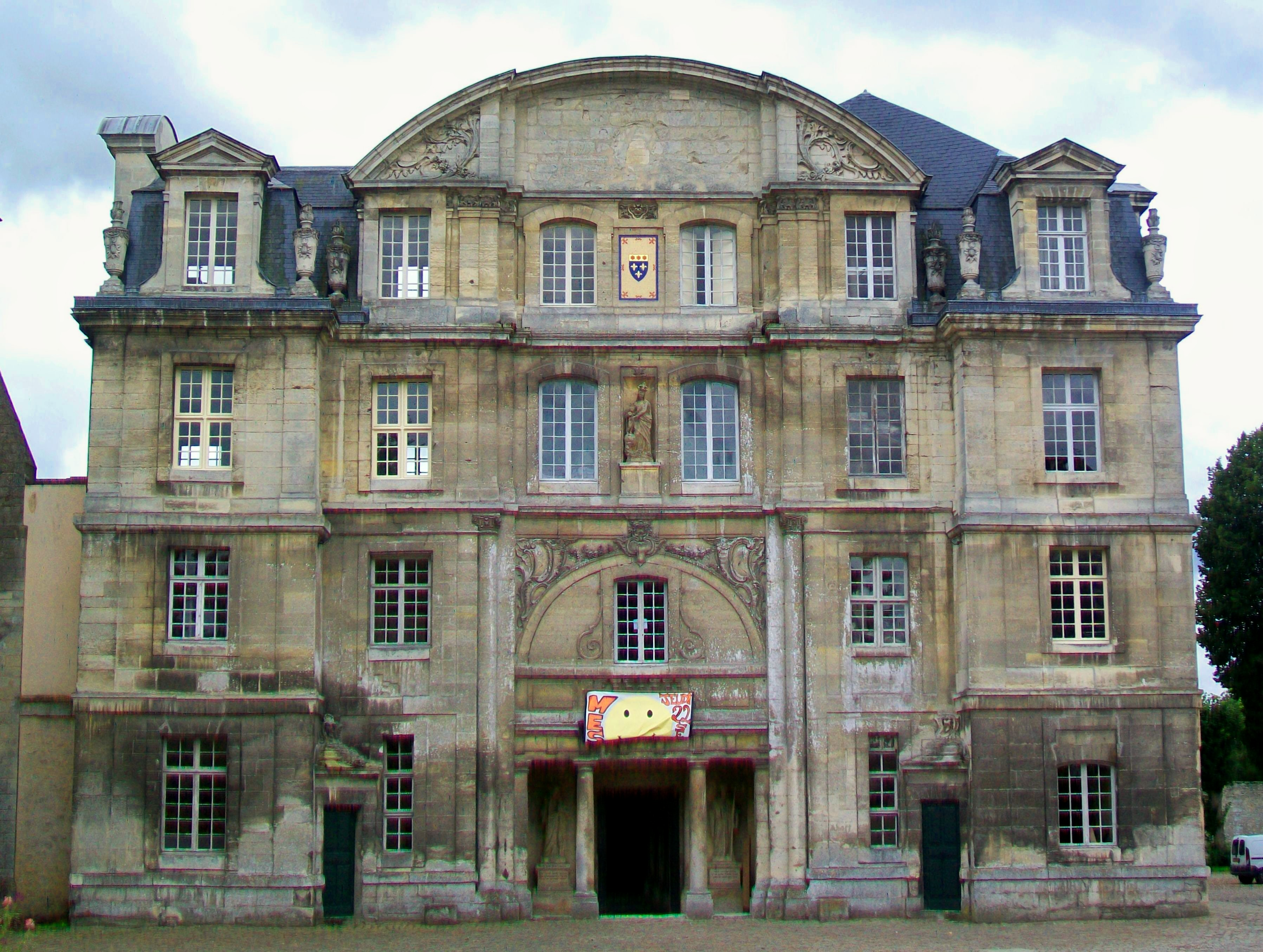 La façade principale nord de l'abbaye, comportant le portail.